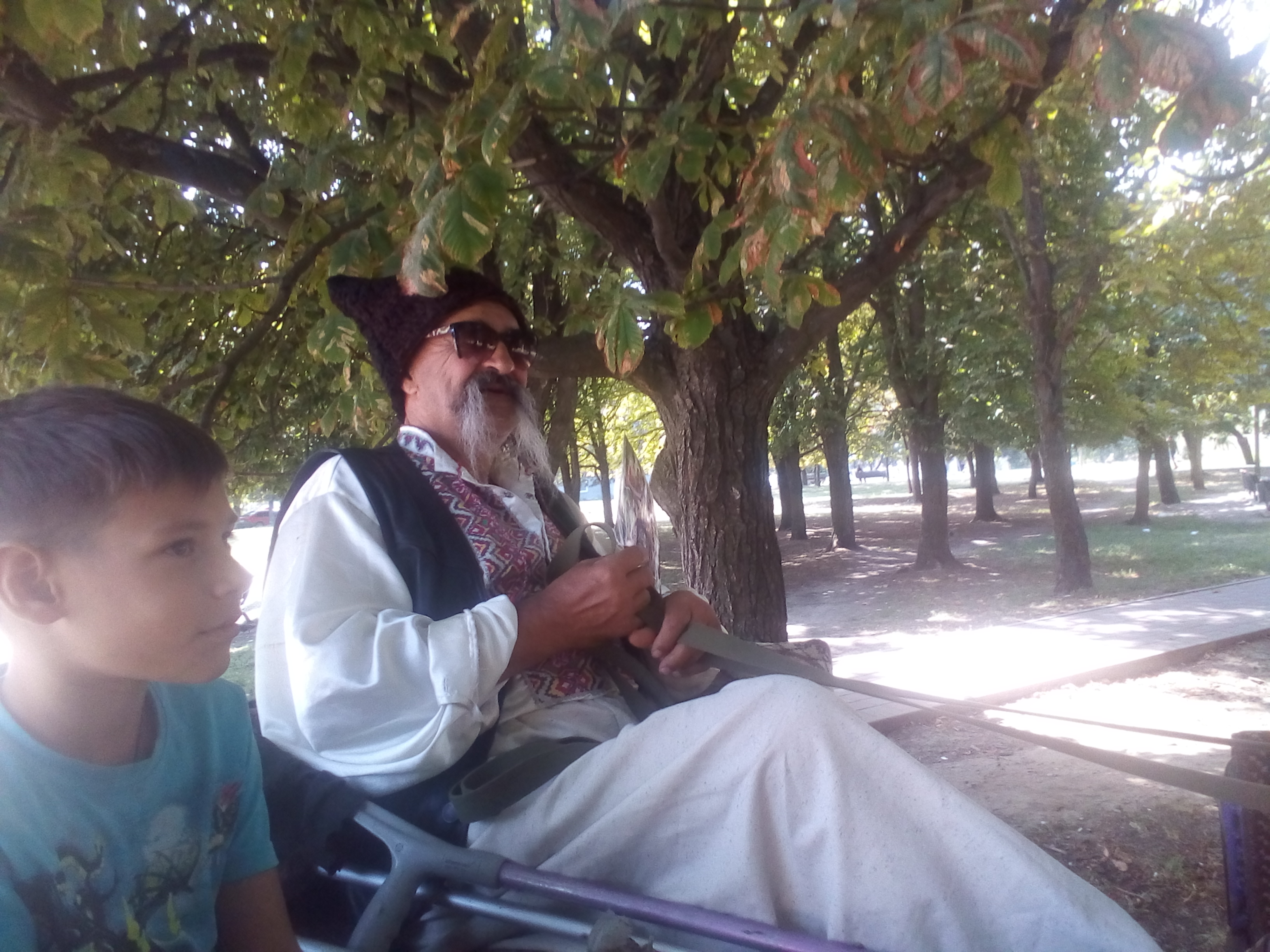 Фото